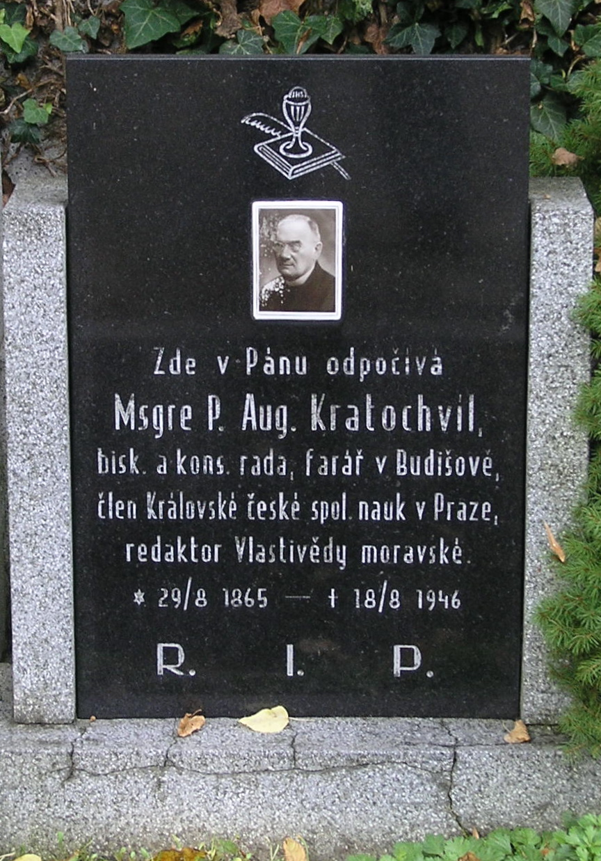 Hrob Augustina Kratochvíla v Bučovicích, člen Královské české společnosti nauk, redaktor Vlastivědy Moravské; *29.8.1865 +18.8.1946